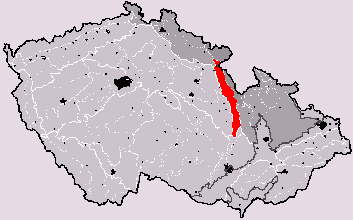 Poloha geomorfologického celku Podorlická pahorkatina v rámci České republiky. Hercynský systém Hercynská pohoří I Česká vysočina I4 (IV) Krkonošsko-jesenická subprovincie I4B (IVB) Orlická oblast I4B-3 (IVB-3) Podorlická pahorkatina